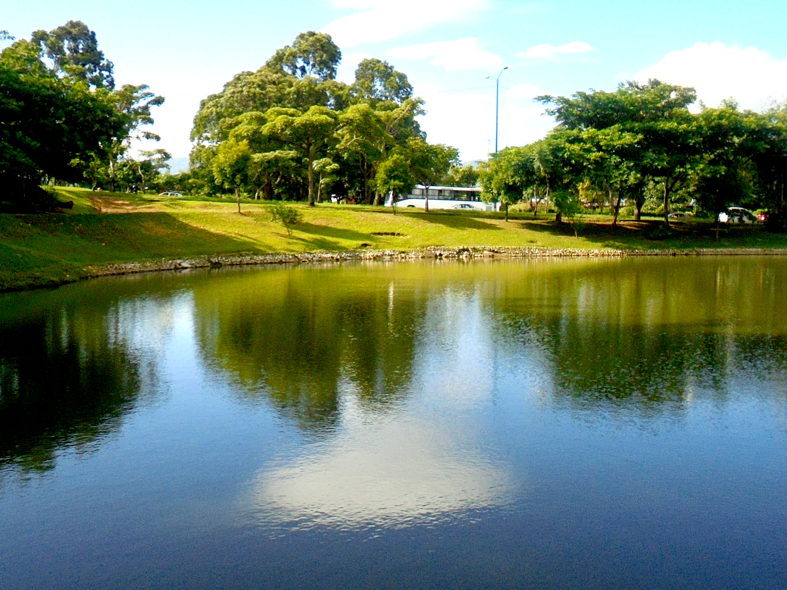 Lagunas del Parque de la paz, al sur de San Jose